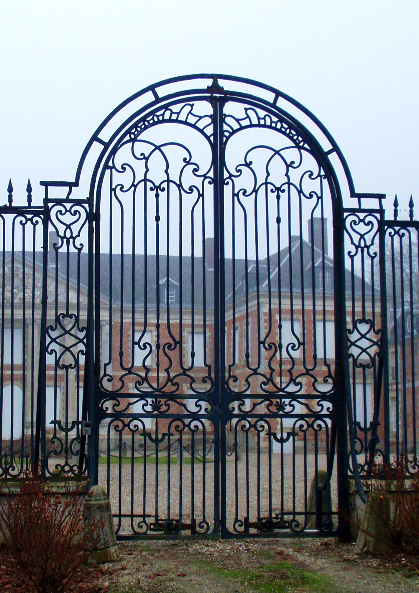 Hénencourt (Somme, France). La grille du château.